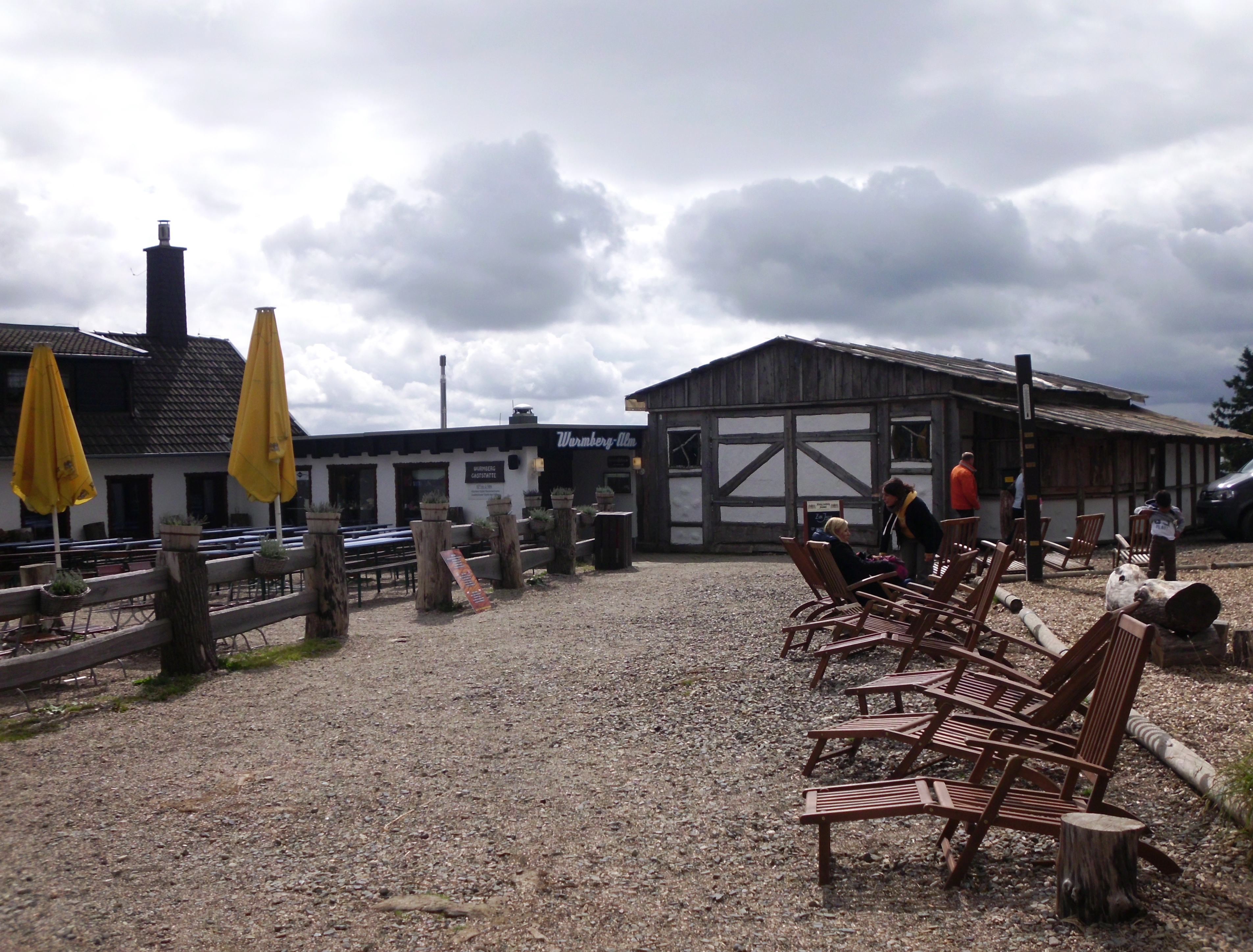 Wurmbergbaude auf dem Wurmberg bei Braunlage